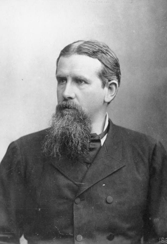 Prof. Friedrich Ratzel Ratzel, Friedrich Geograph [Prof. Friedrich Ratzel (1844-1904), Naturwissenschaftler, Geograf] Abgebildete Personen: Ratzel, Friedrich Prof.: Geograph, Deutschland ( GND 118598538 )